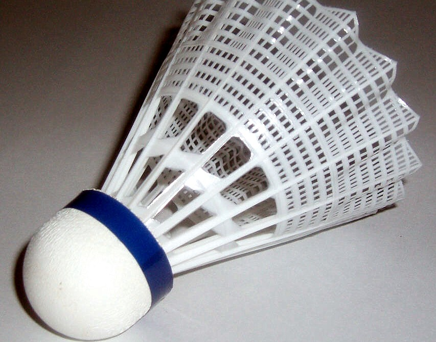 Shuttlecock